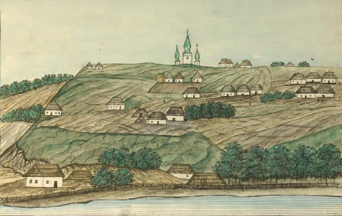 Білогородка. Домінік П'єр де ля Фліз. «Медико-топографічний опис державних маєтностей Київської округи з зображенням деяких природних витворів рослинного і тваринного світу, разом із статистикою кожного села, їхнім виглядом, зробленим з натури, зображенням селянських костюмів та географічною картою Київської округи». Київ, 1854. - с. 698